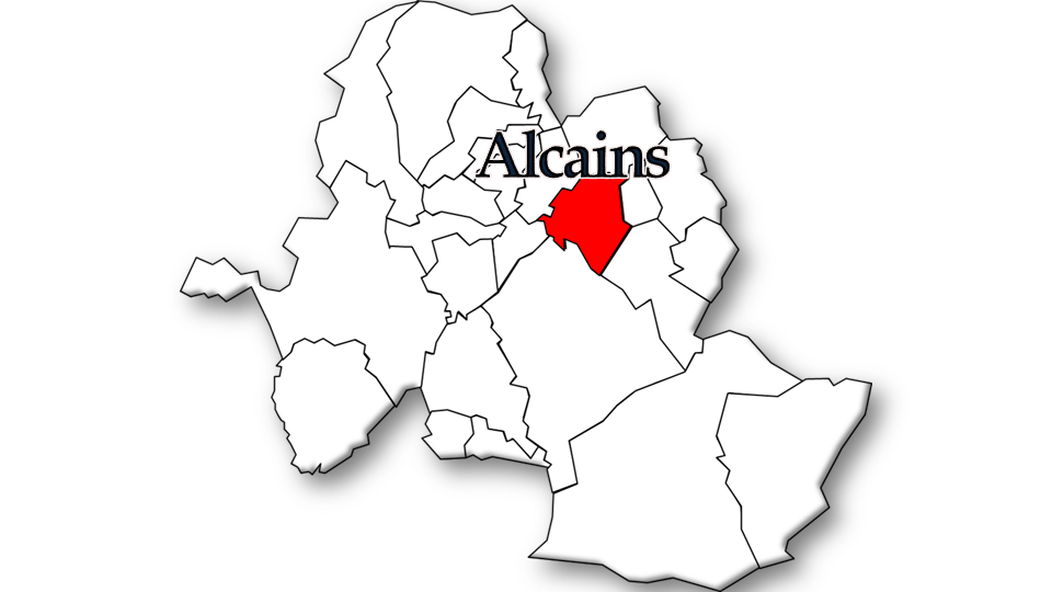 População